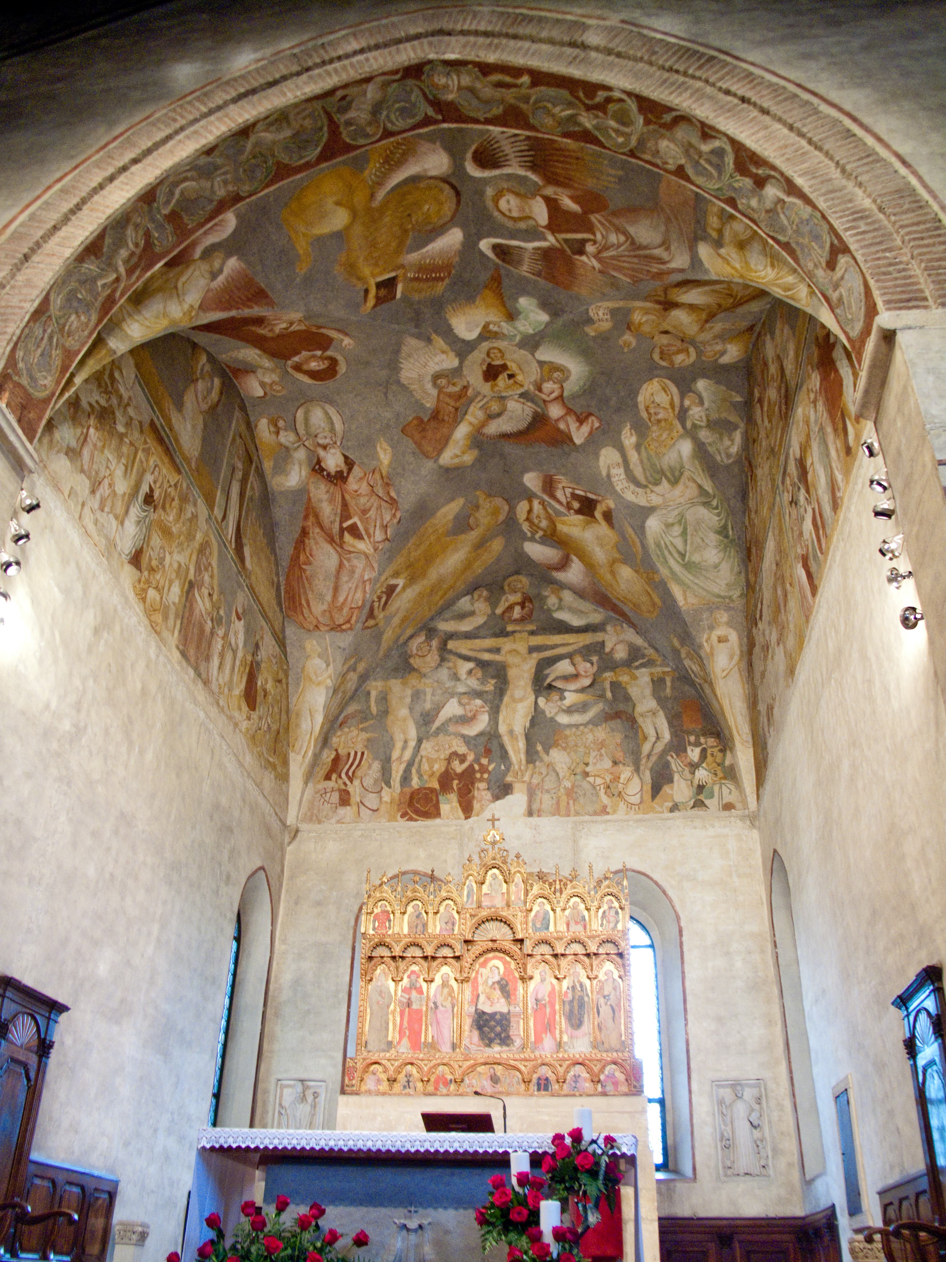 Chiesa di Sant'Agostino - Interno